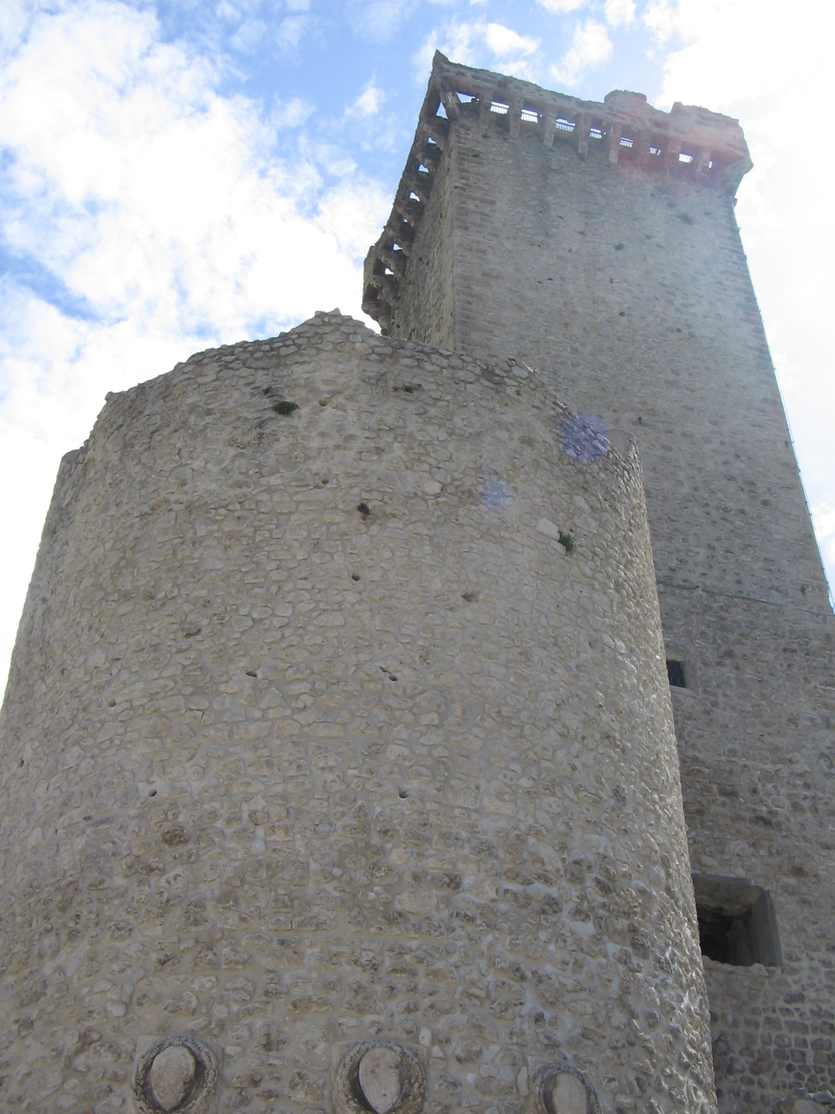 Pacentro AQ: Castello Caldora